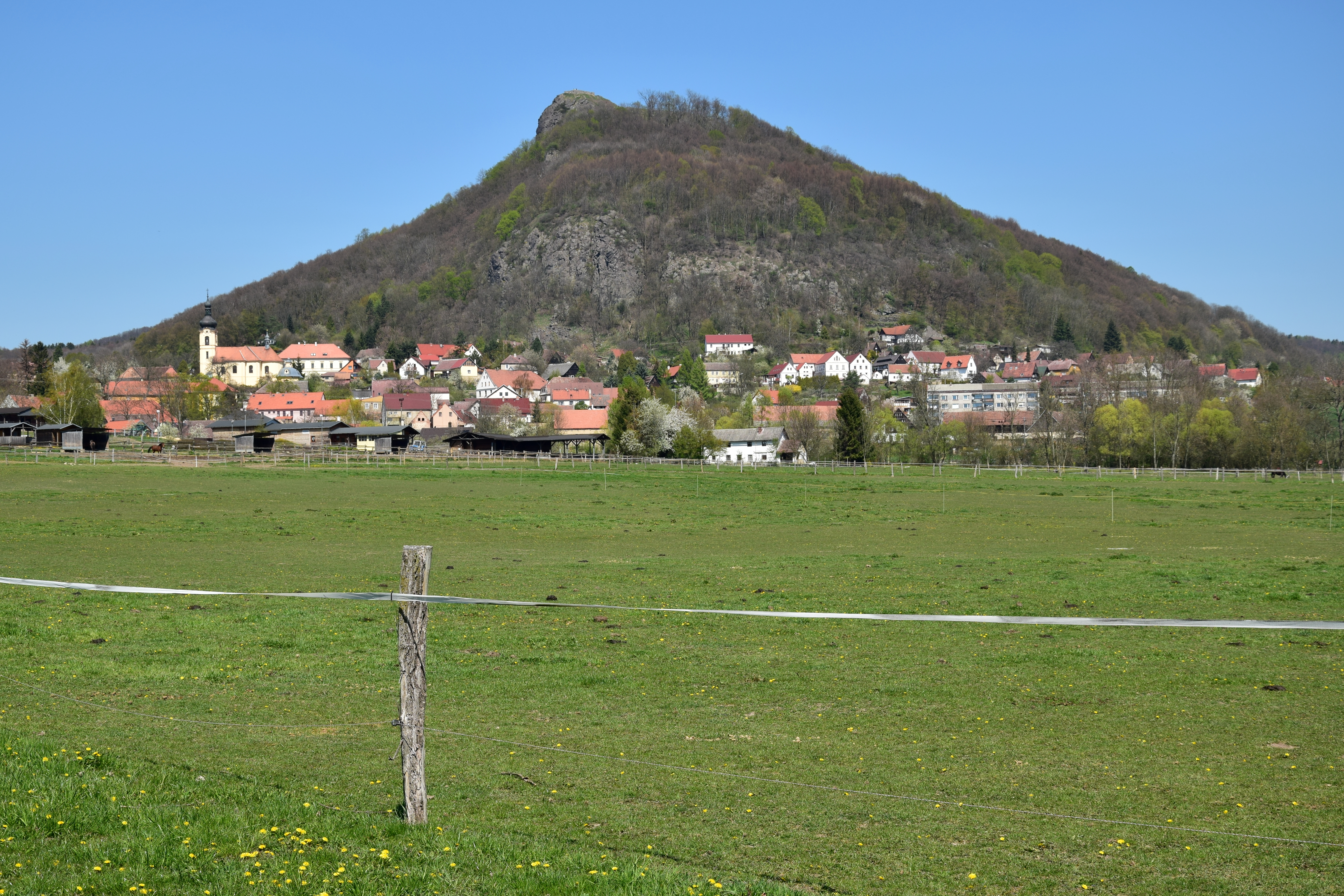 Třebušín a vrch Kalich